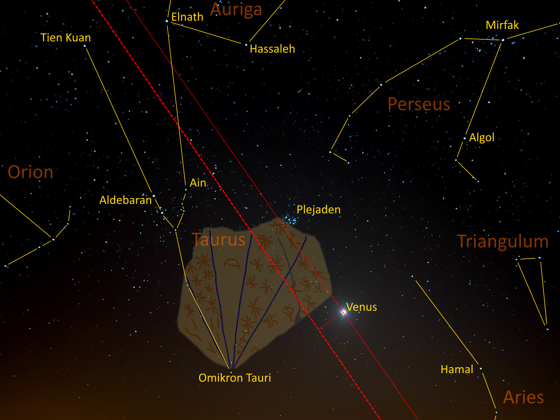 Die Venus im Kegel des Zodiakallichts 8 Dezimalgrad über dem westlichen Horizont am 23. März 2020. Der Zeitpunkt war elf Tage vor dem Erreichen des Goldenen Tors der Ekliptik mit den Plejaden am 3. April 2020, wo die Venus eine ekliptikale Breite von 3,8 Dezimalgrad erreicht hatte. Darstellung mit der Himmelstafel von Tal-Qadi sowie mit Ekliptik, allen hellen Sternen und den heutigen Sternbildern.